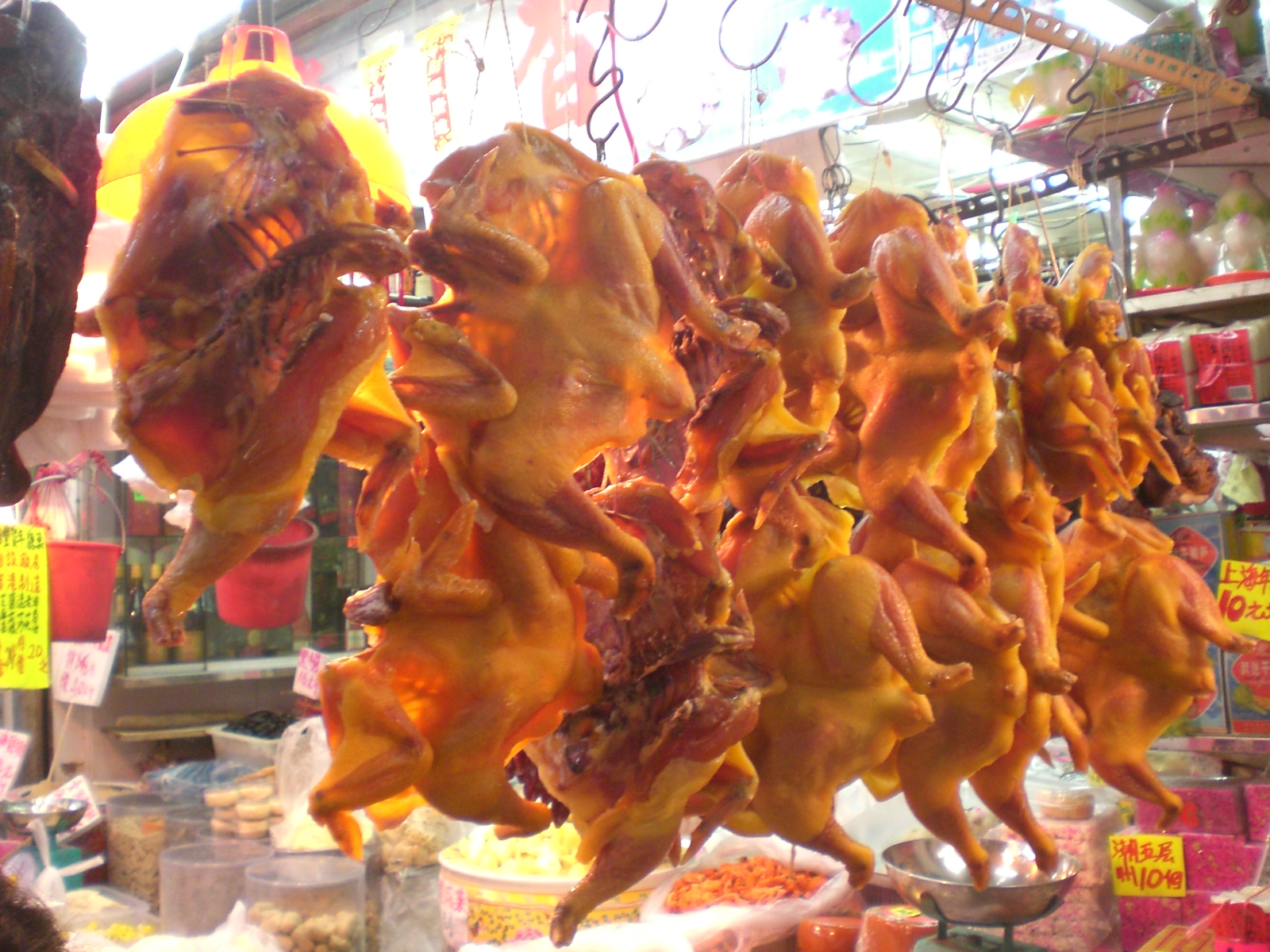 觀塘瑞和街街市台灣臘雞